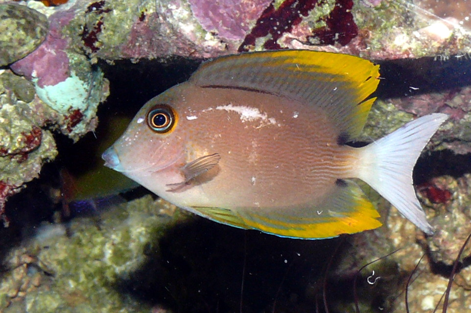 Tomini-Borstenzahndoktorfisch (Ctenochaetus tominiensis)